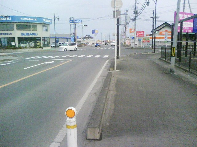 亘理町（亘理から荒浜への道）